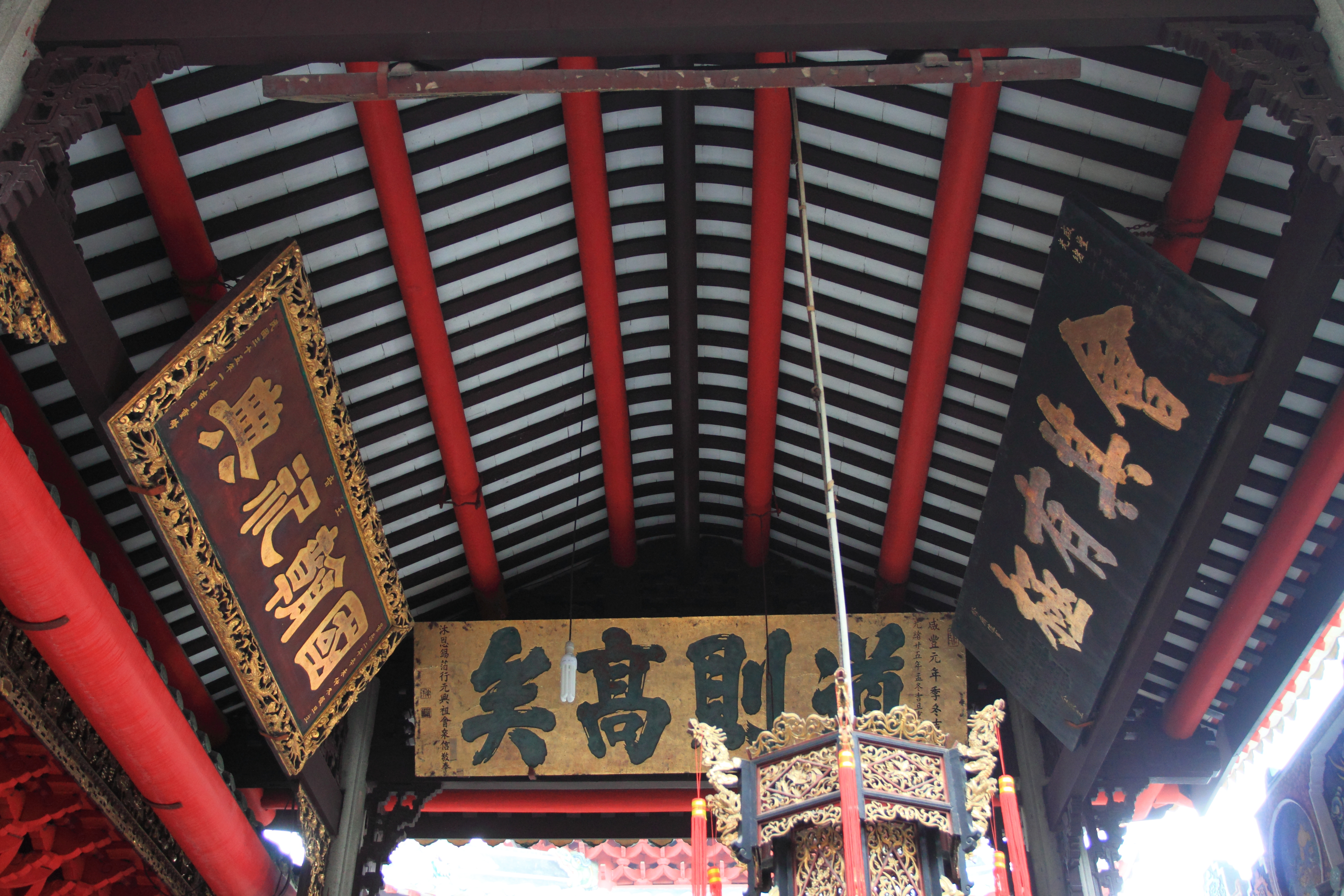 佛山祖庙